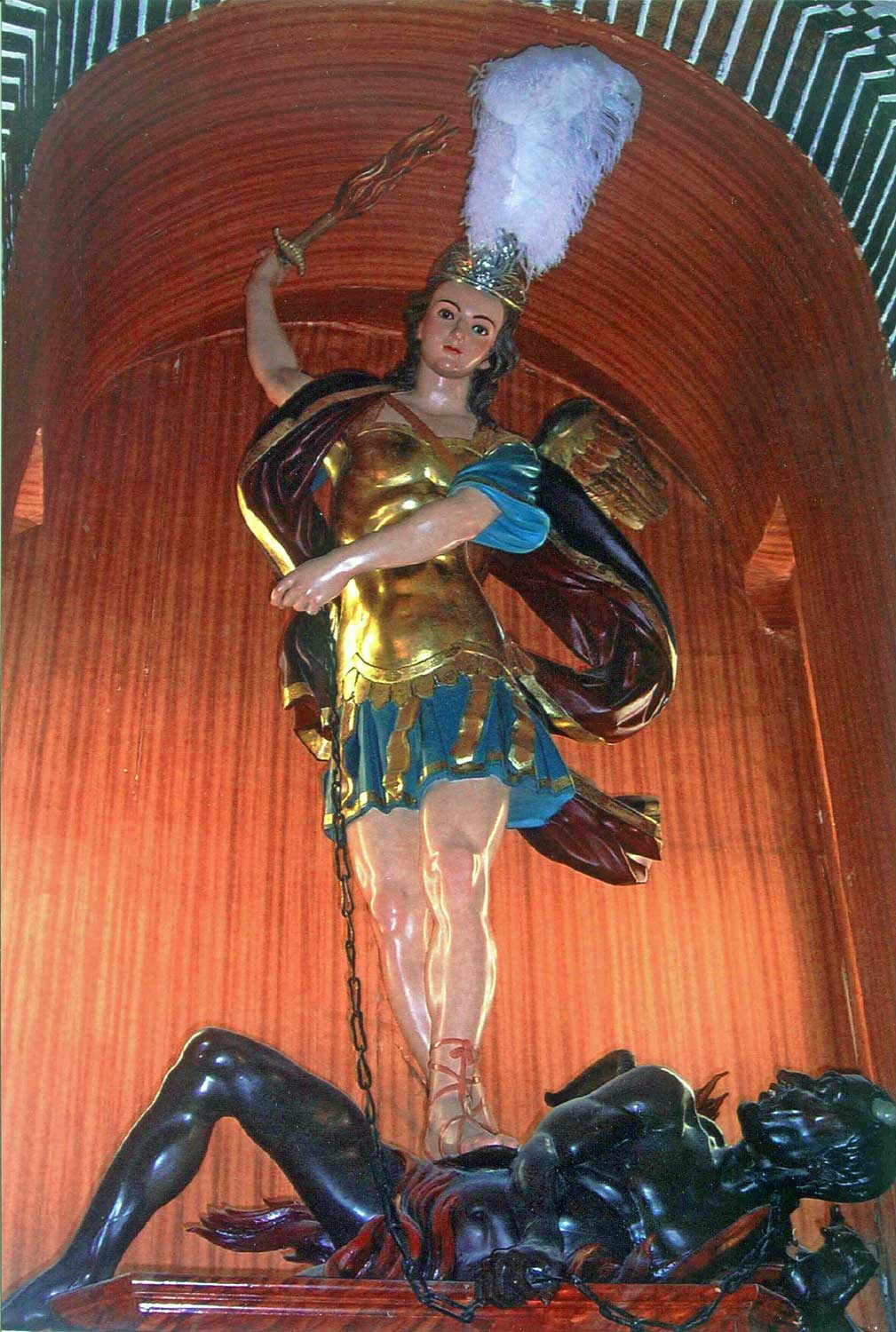 San Miguel Arcangel, realizado por Antonio Cano Correa en 1941, en madera de pino policromada a tamaño natural para la Iglesia Parroquial de San Miguel Arcangel de Pulpí (Almería).